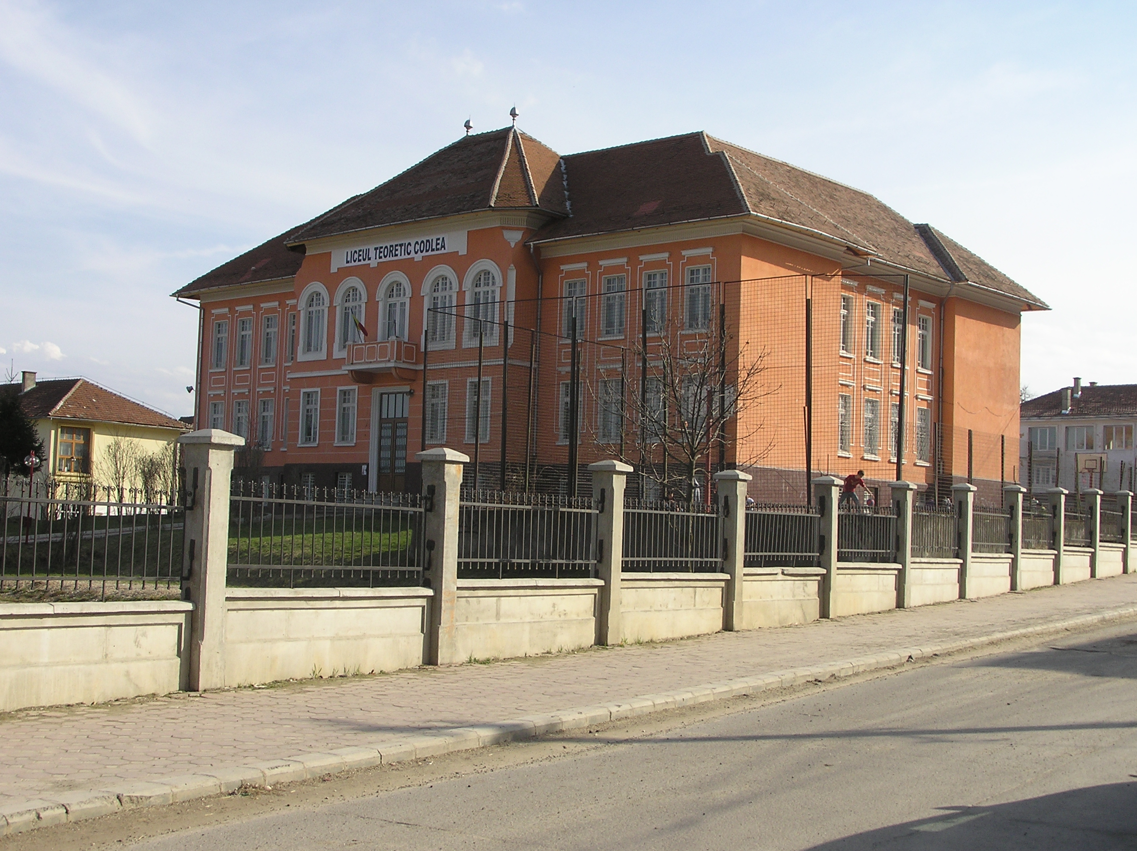 Schule in Codlea / Zeiden, Siebenbürgen, Rumänien.